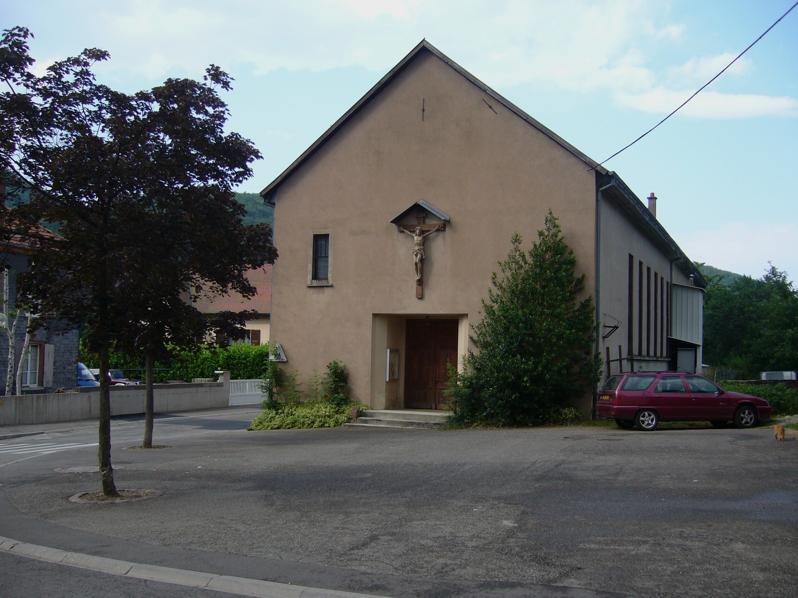 Sainte Marie-aux-Mines 026.JPG